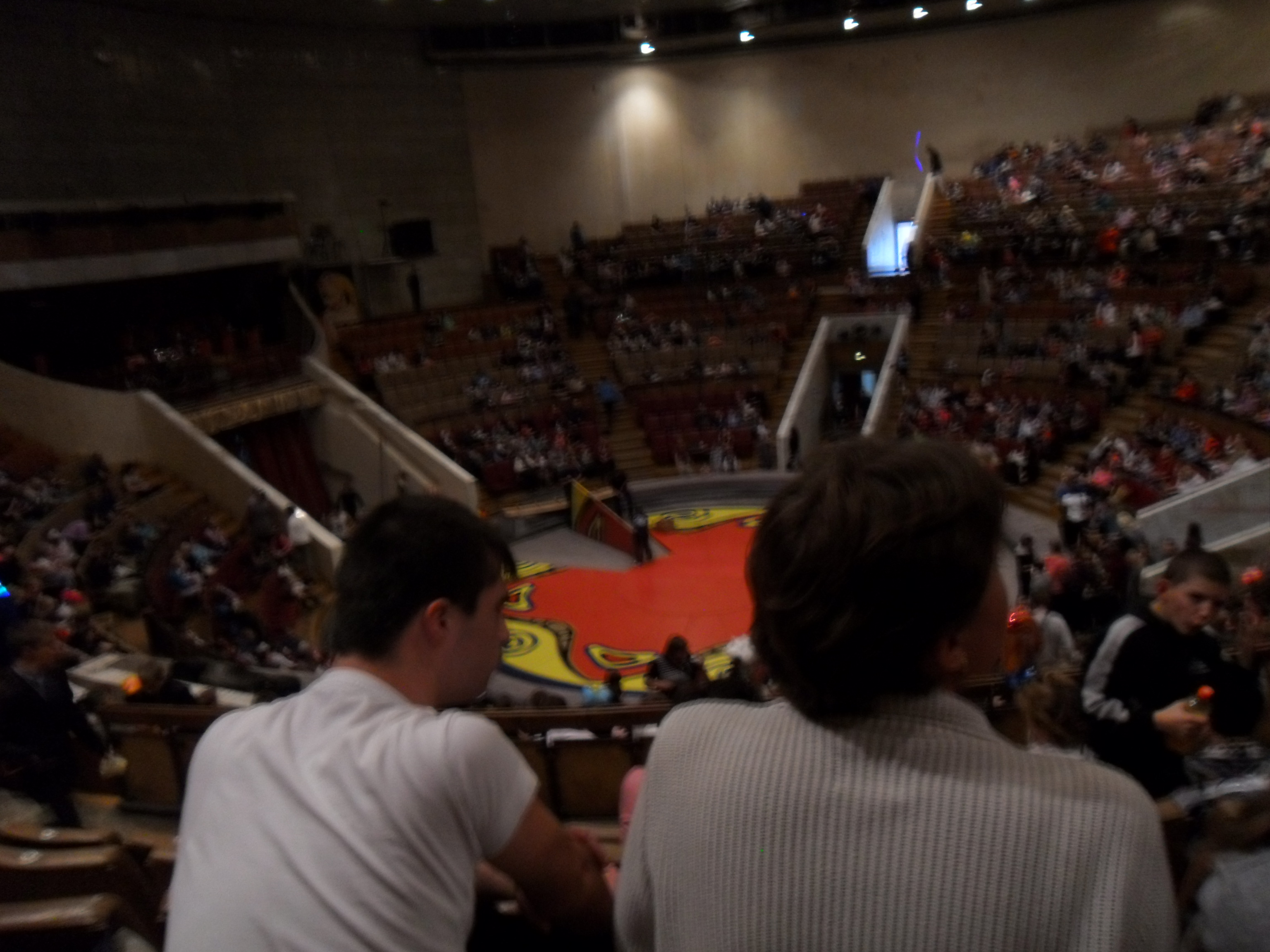 Арена Воронежского Государственного цирка (2011)